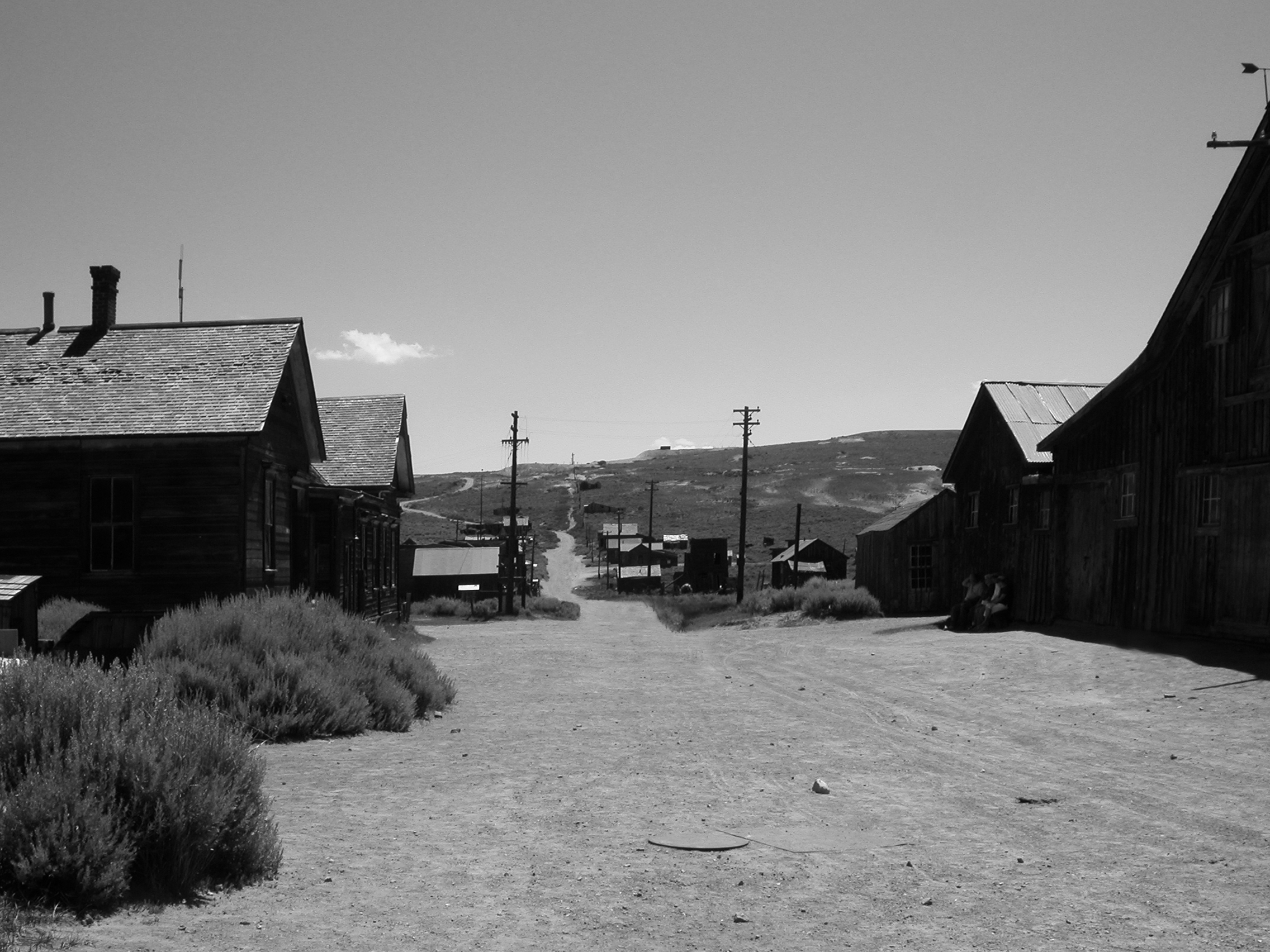 Bodie, California, USA